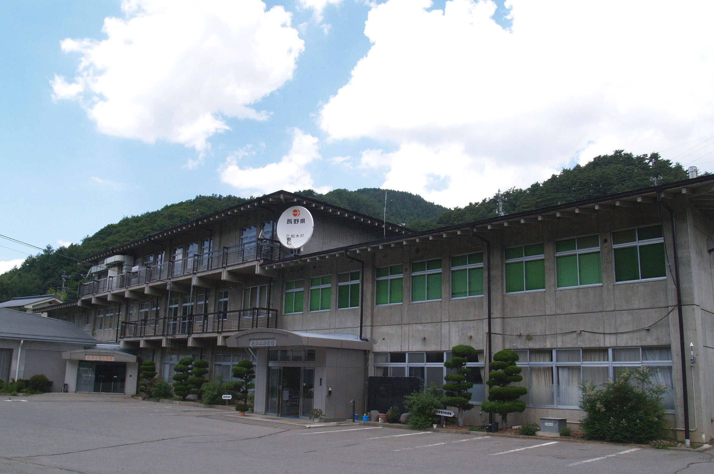 北相木村役場